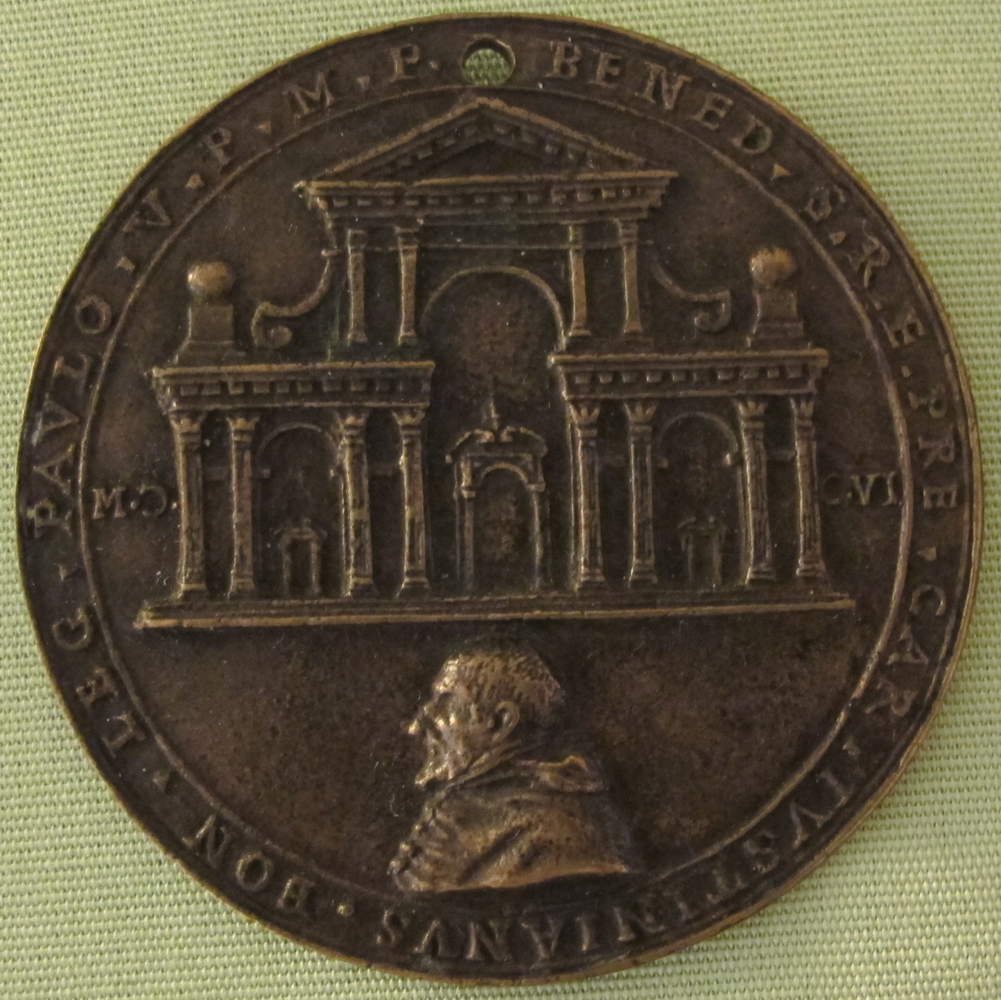 Anonimo, med. del card. benedetto giustiniani, v. con san paolo decollato a bologna, 1606